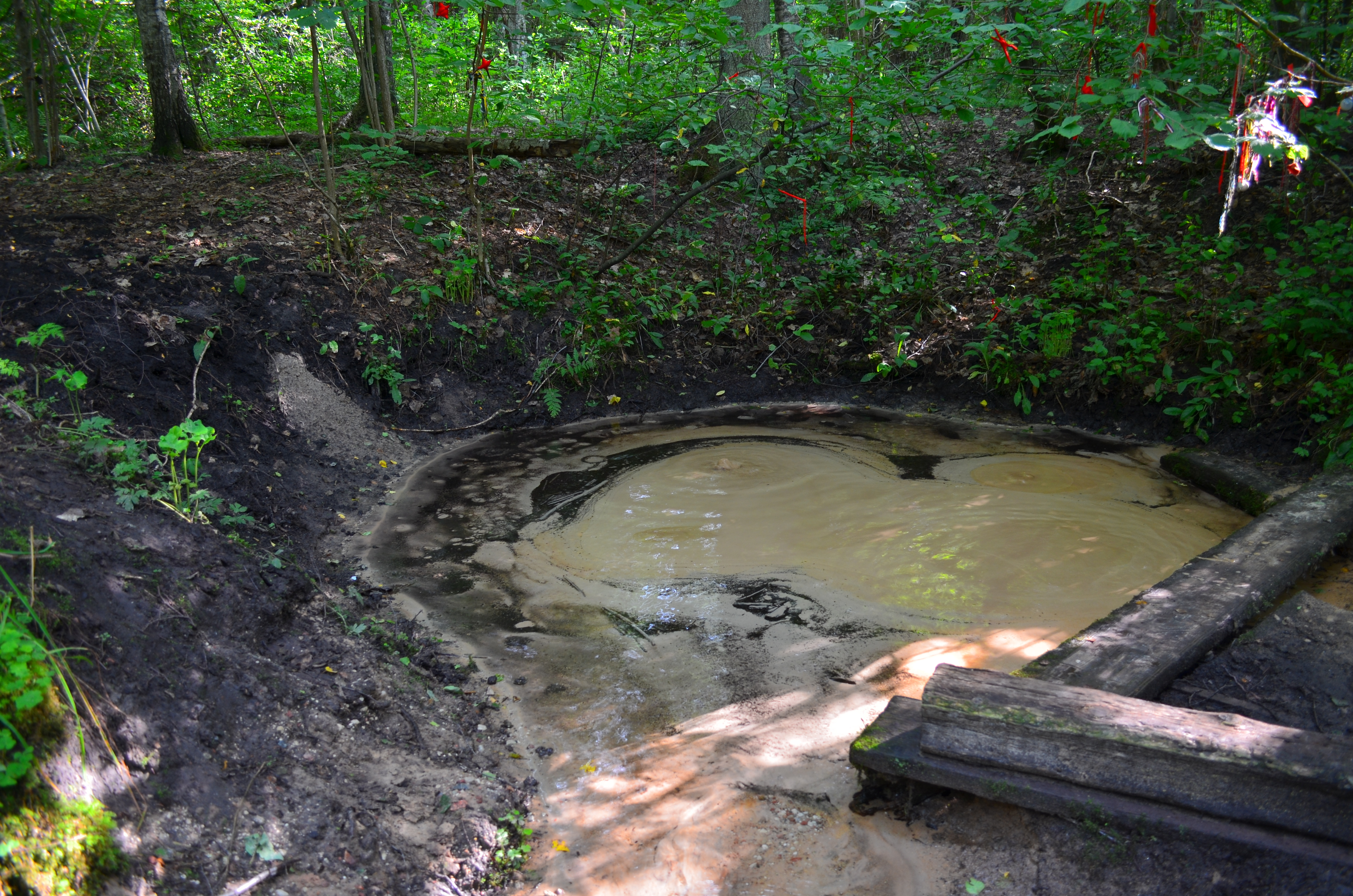 Baltavots / White spring